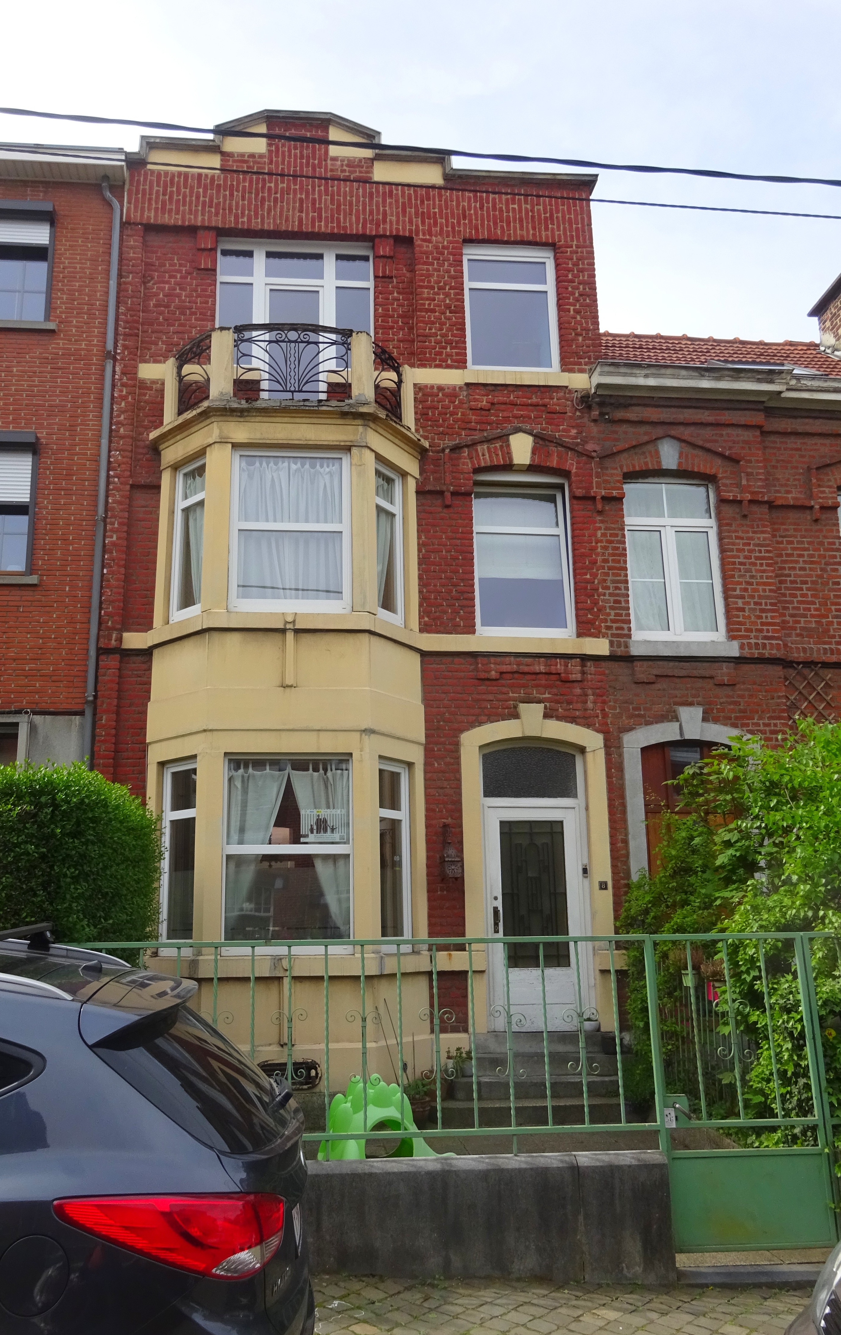 Maison avec loggia Art déco